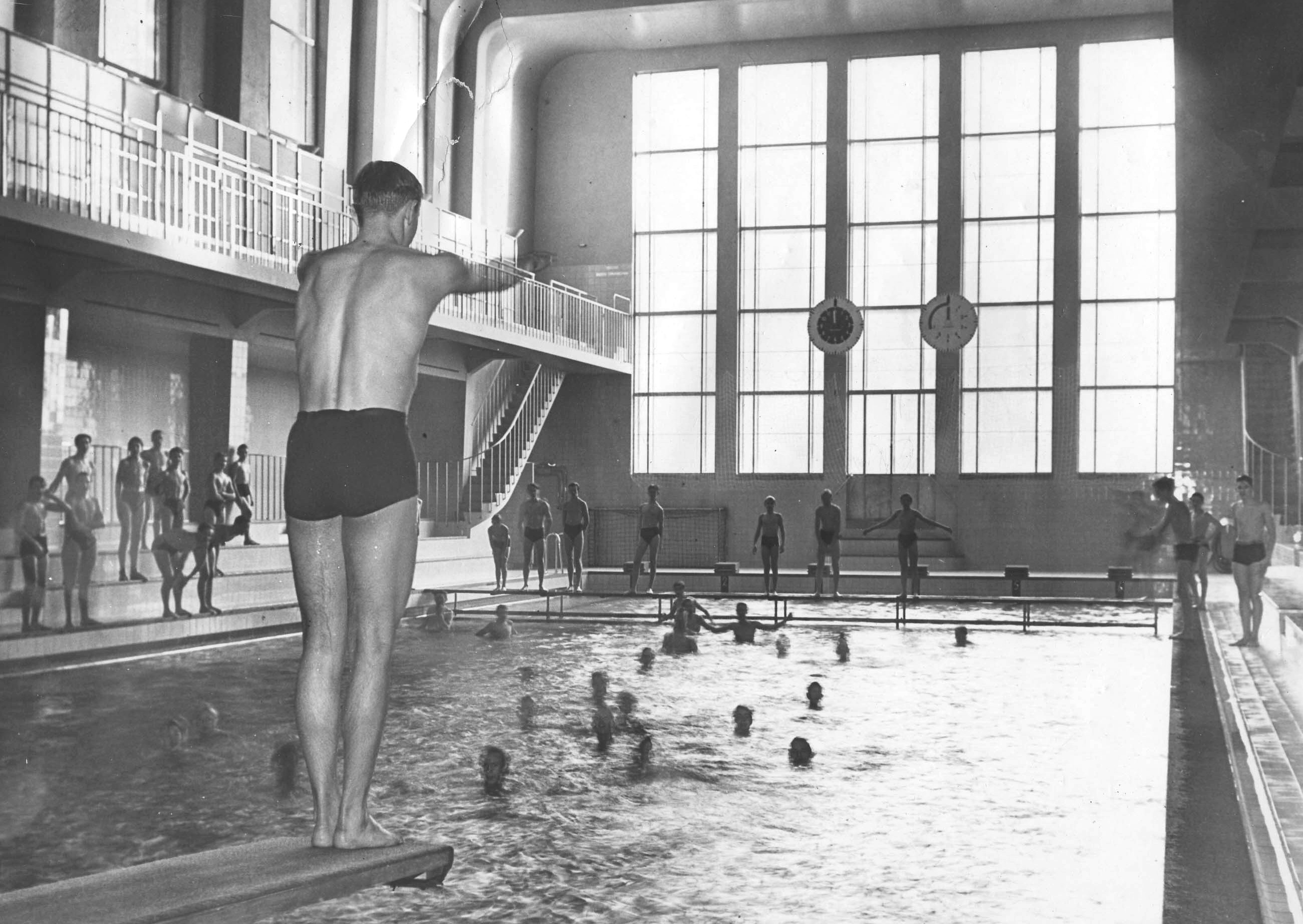 Forsgrenska badet: I simhallen 23 november 1939